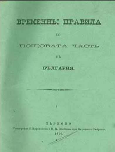 Обложка «Временных правил по почтовой части в Болгарии»